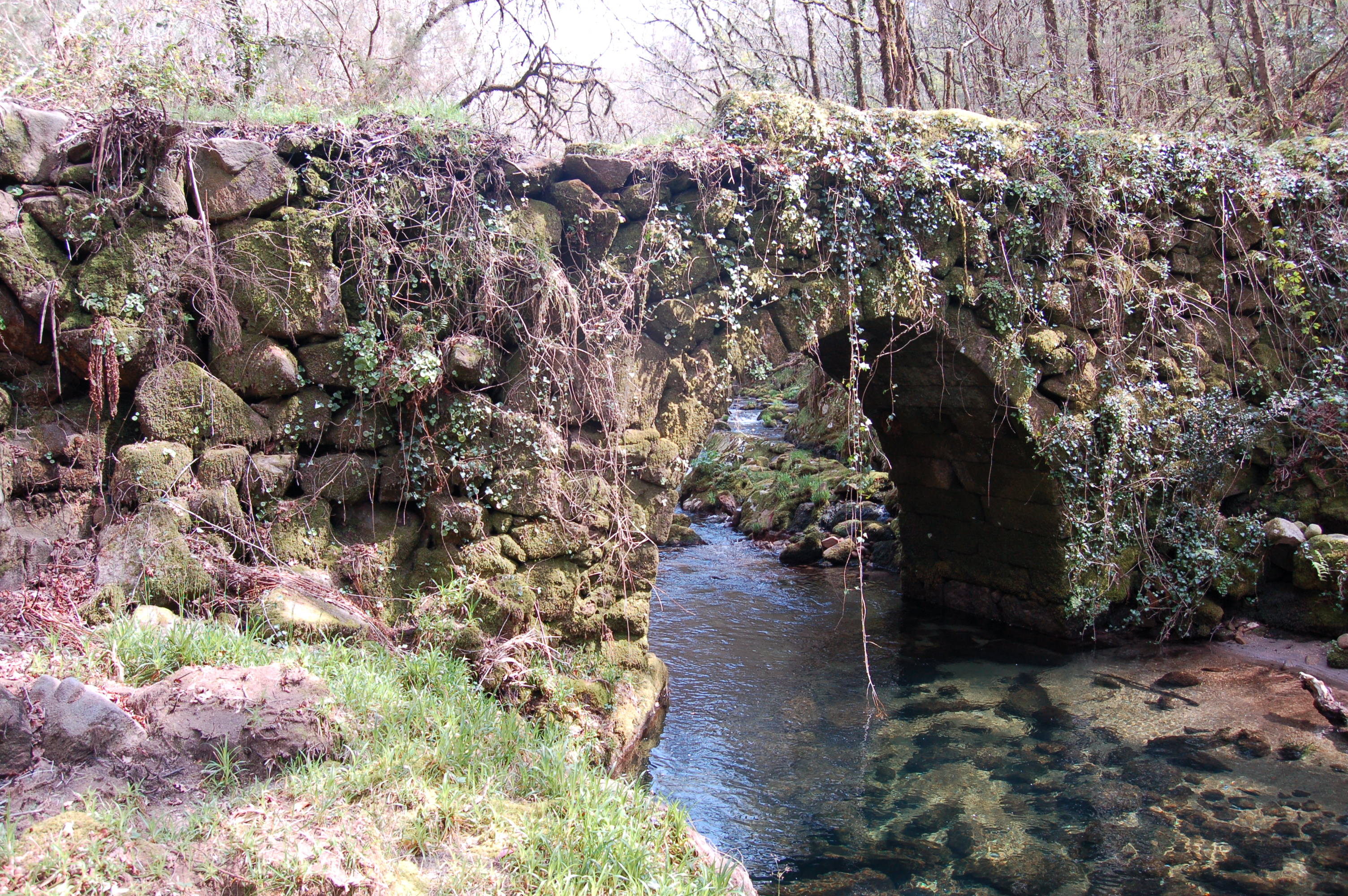 Ponte Serrapio, sobre o río Almofrei en Corredoira (Cerdedo-Cotobade)